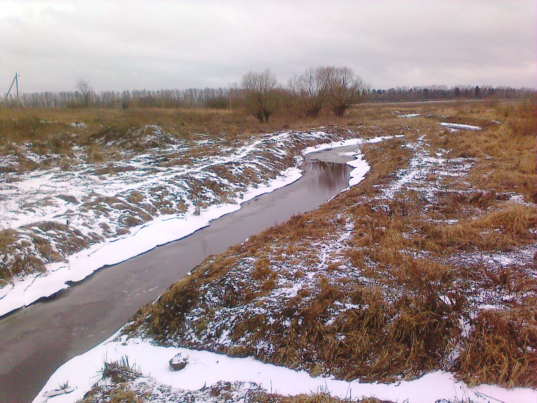 река Белица у деревни Микуличи